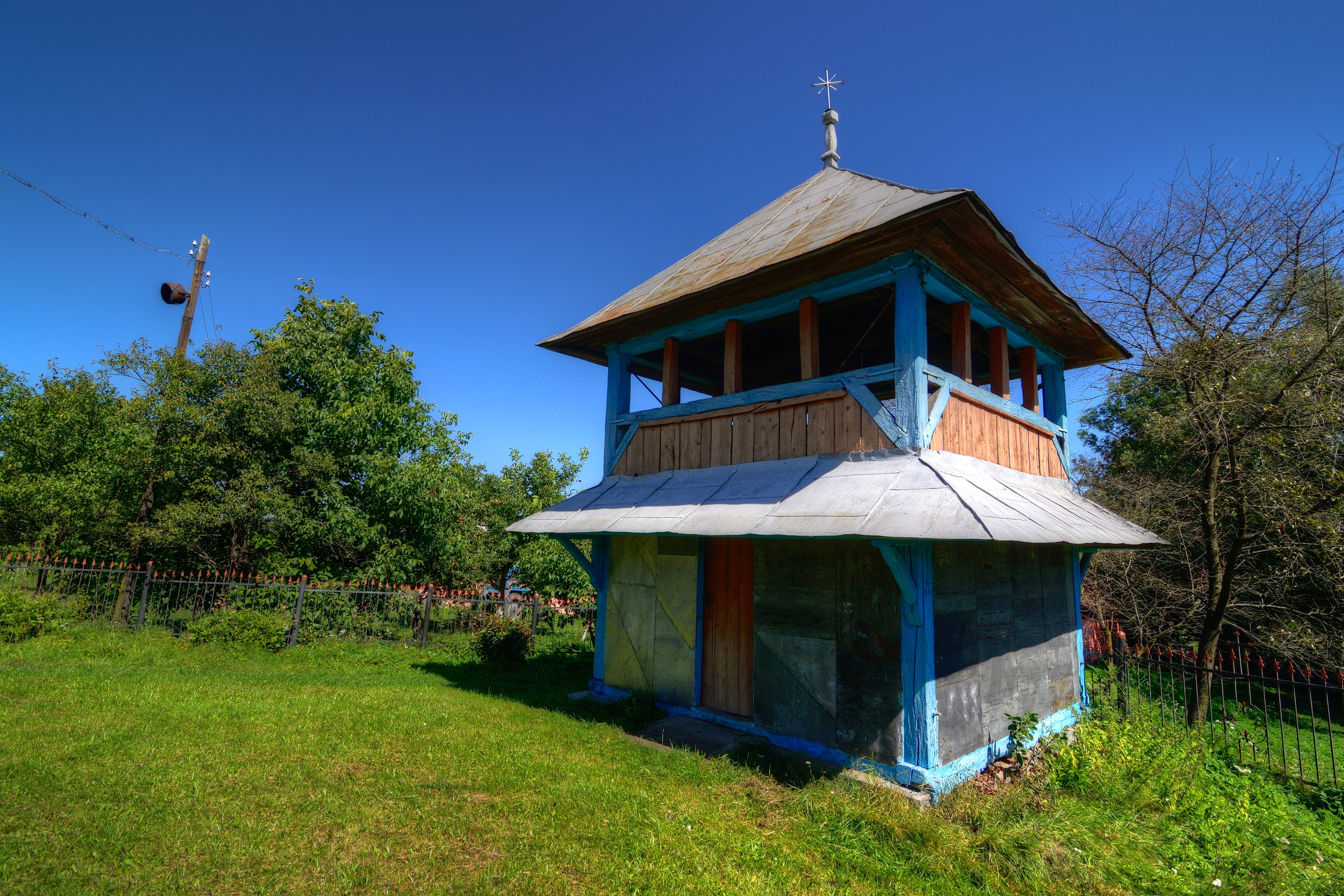 Дерев'янна дзвіниця в селі Черемхів Жидачівського району